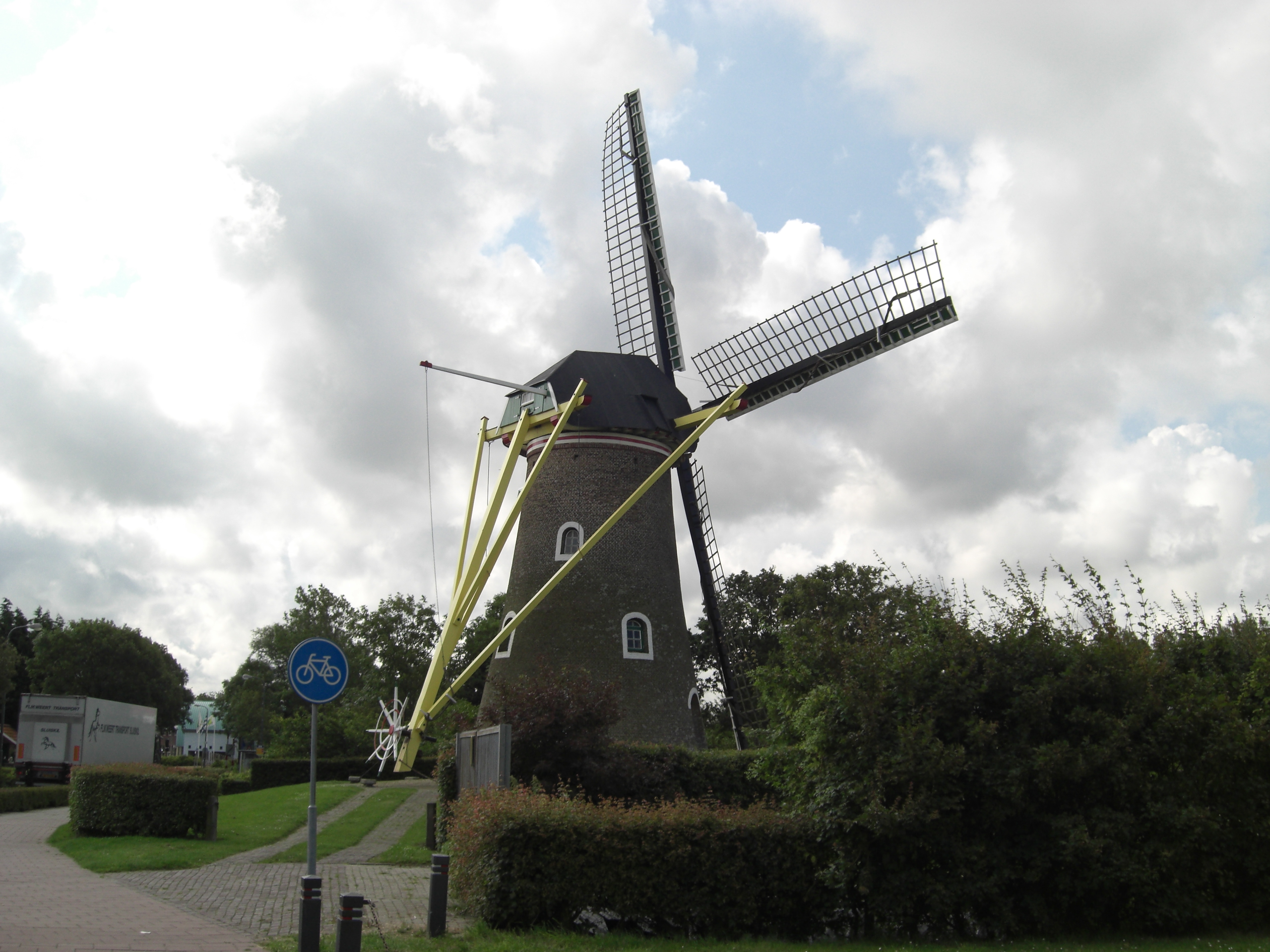 korenmolen Weltevreden (Domburg)